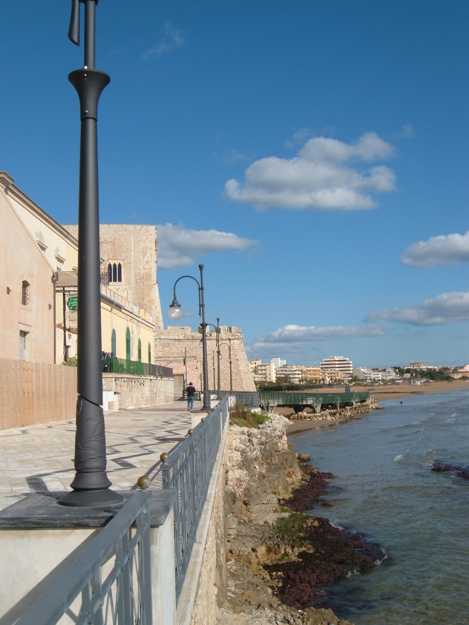 vista della costa prospiciente Pozzallo